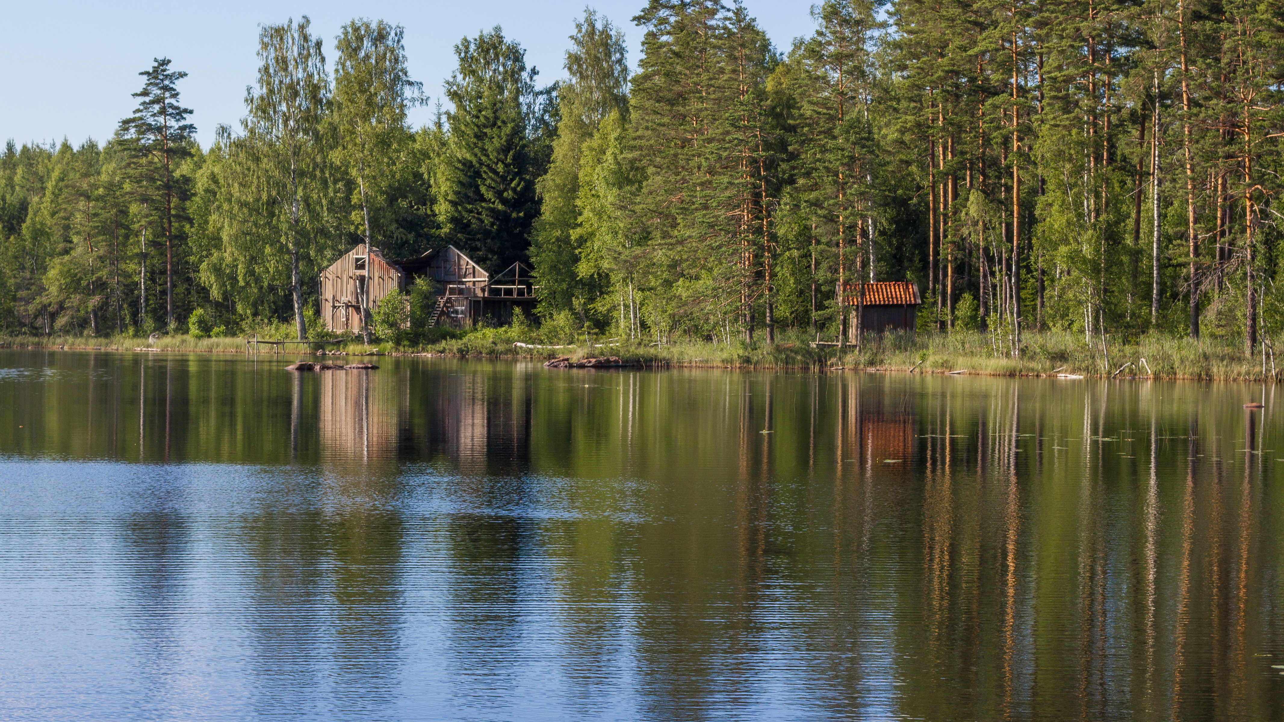 Soten, Dalarna med Kämpeladan från Farmen.